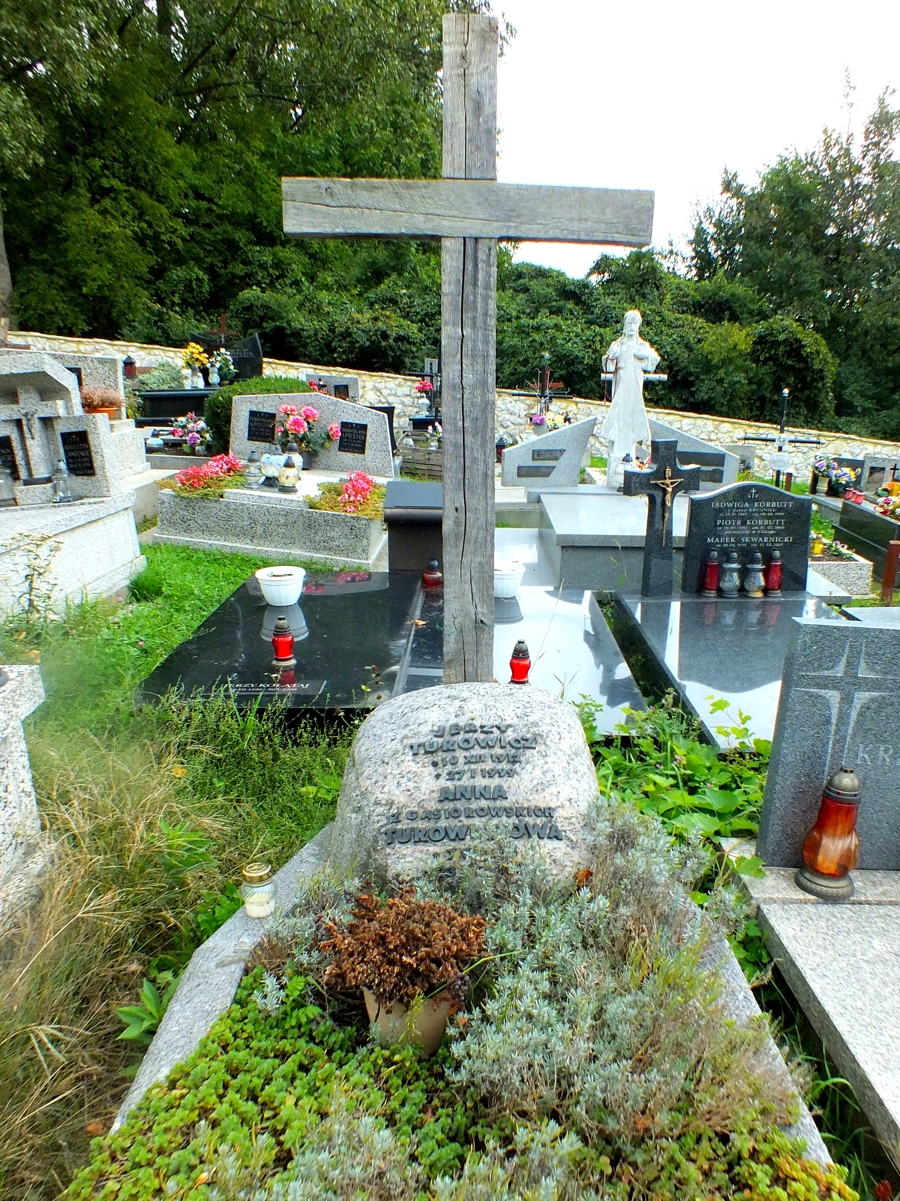 Kraków, Tyniec, cmentarz parafialny - grób Anny i Jerzego Turowiczów